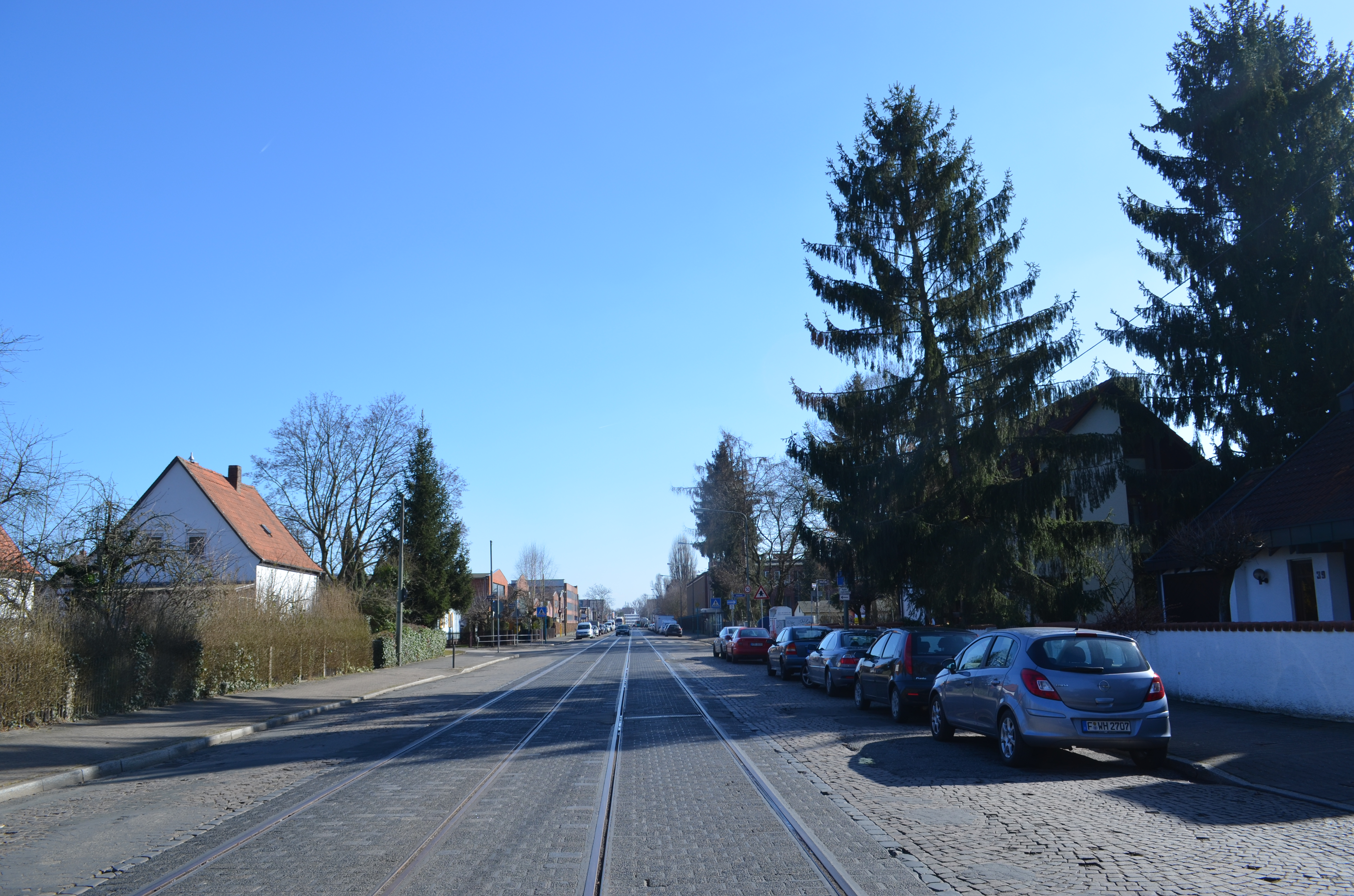 Frankfurt-Seckbach, Gwinnerstraße